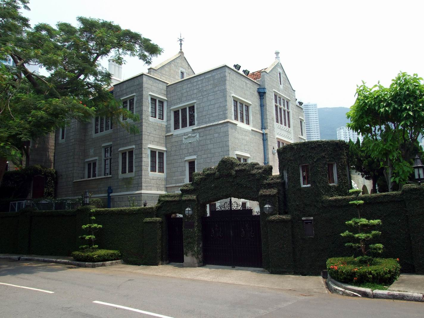 霍家沙宣道大宅「石頭莊園」. 粵語: 霍家沙宣道大宅「石頭莊園」. No. 33 Sassoon Road, Stone Manor, Pok Fu Lam